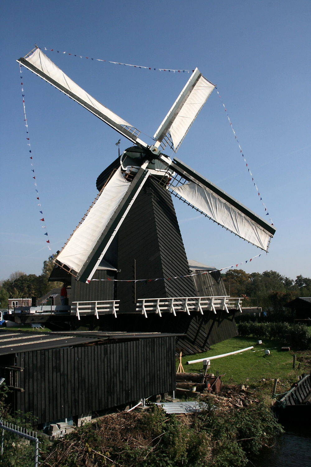 Haarlem: molen De Eenhoorn op regionale molendag 2008